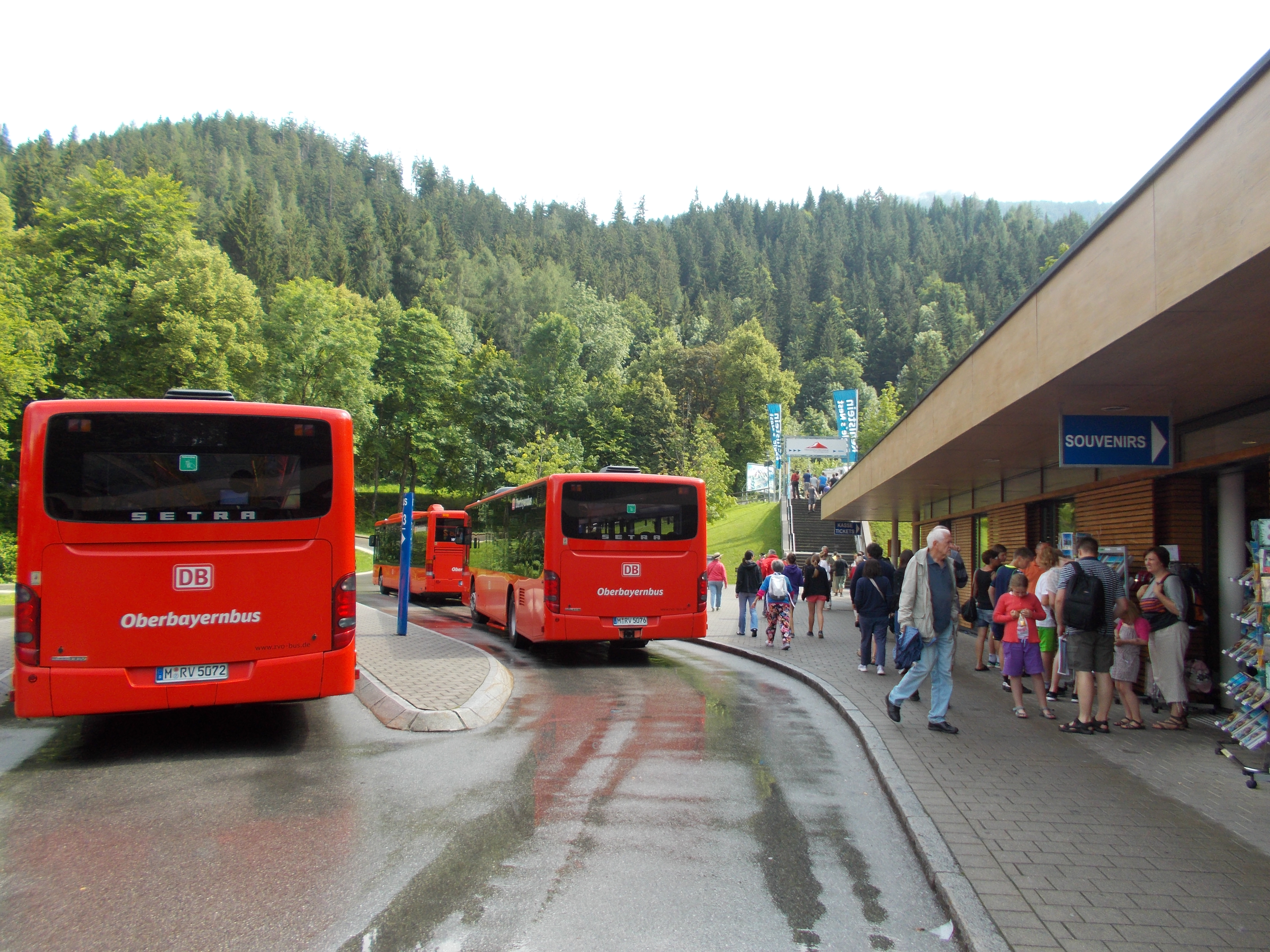 Berggasthof Obersalzberg-parcheggio pullman